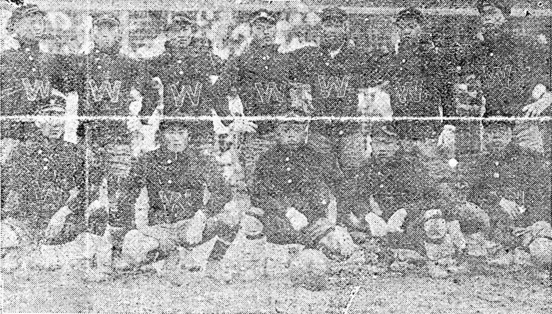 1922년 전국체육대회 축구(제2회 전조선축구대회) 중학부에서 우승한 휘문고등보통학교 선수단의 모습.